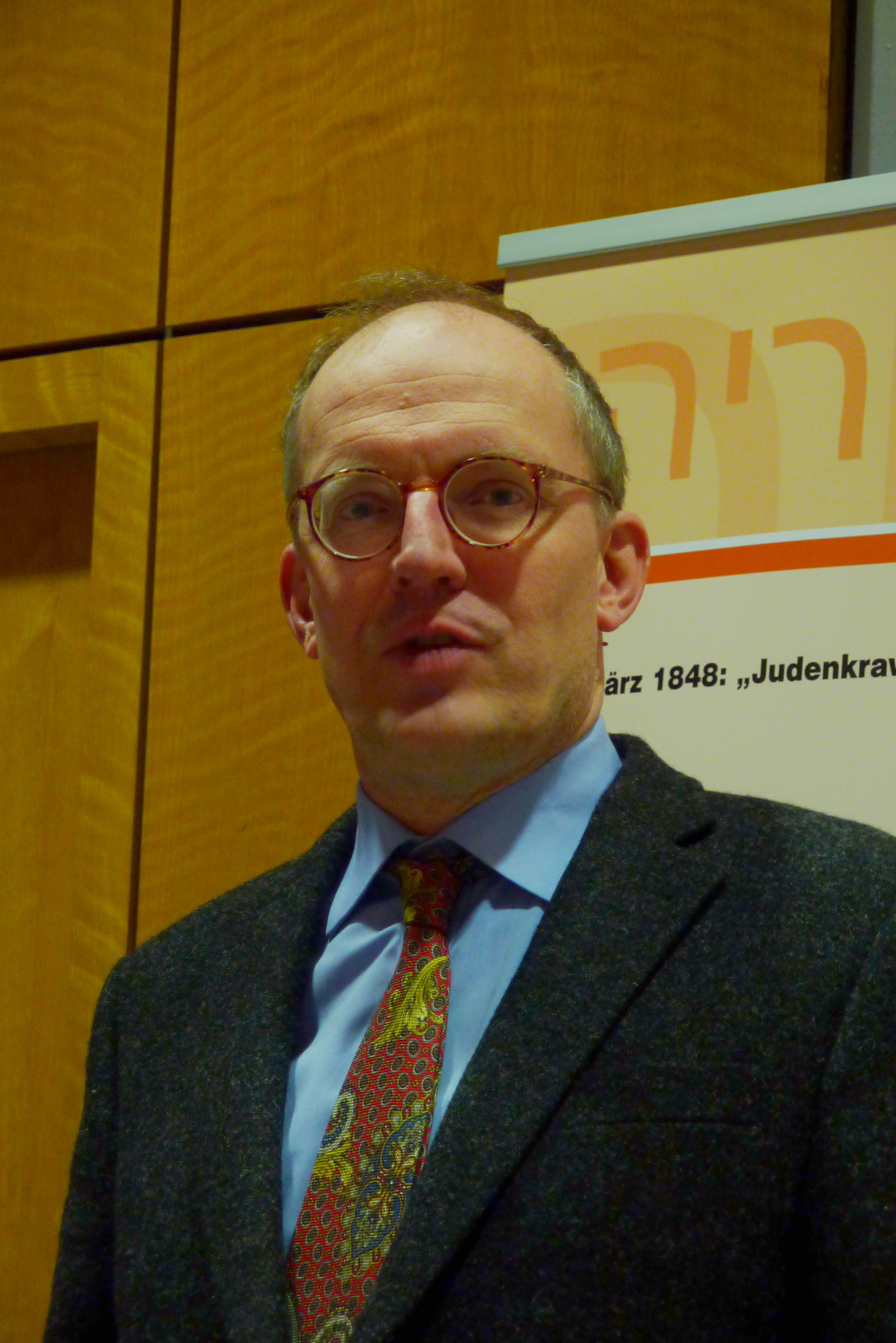 Uri Kaufmann bei einem Vortrag in Eppingen